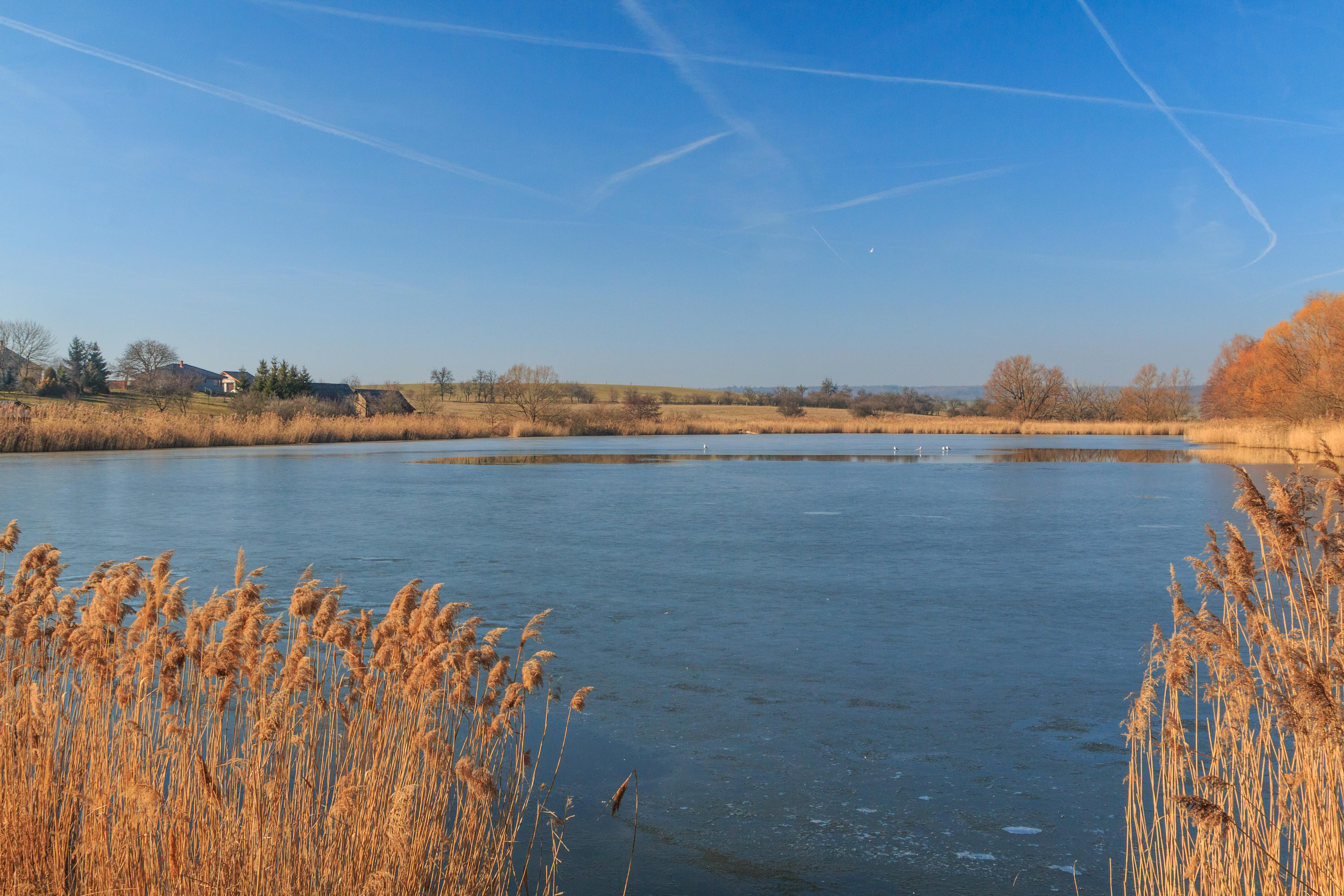 pohled na Žitovlický rybník Project: Vodstvo Ticket: 1711.